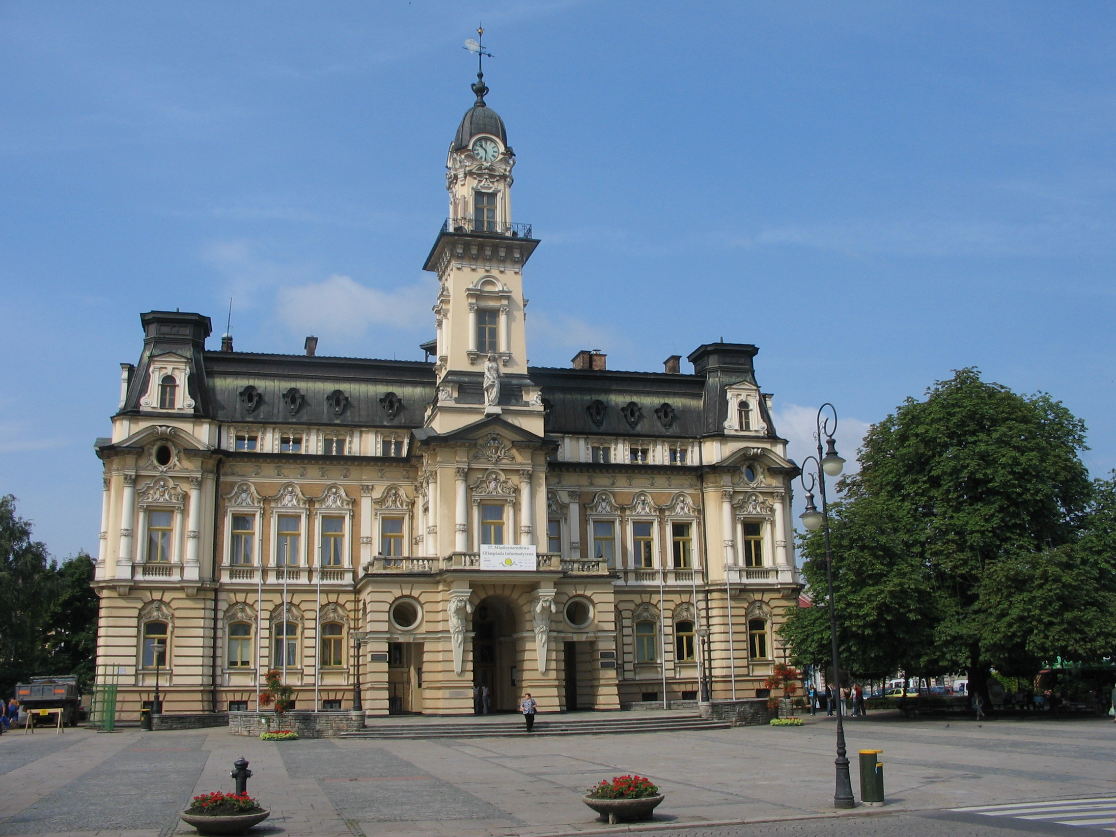 Ratusz w Nowym Sączu